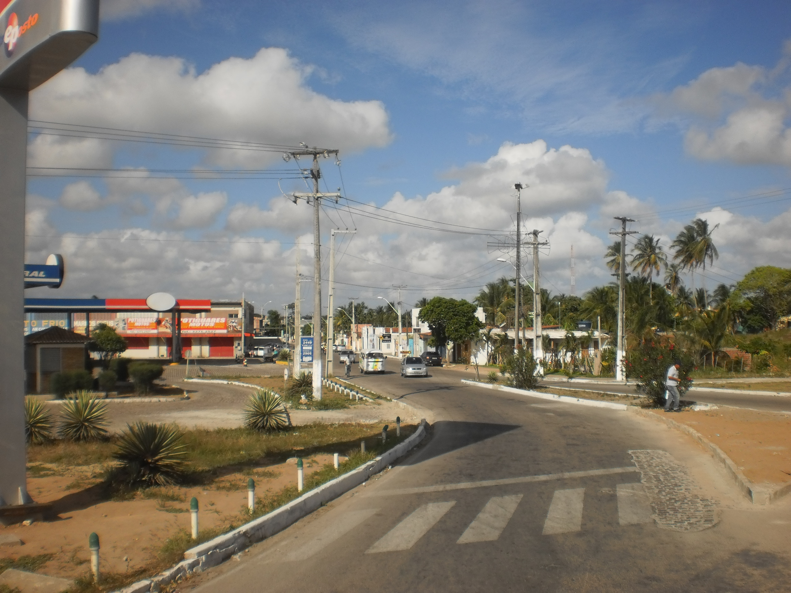 Avenida Jundiaí no cruzamento com a BR-304, na entrada de Macaíba - Rio Grande do Norte, Brasil.